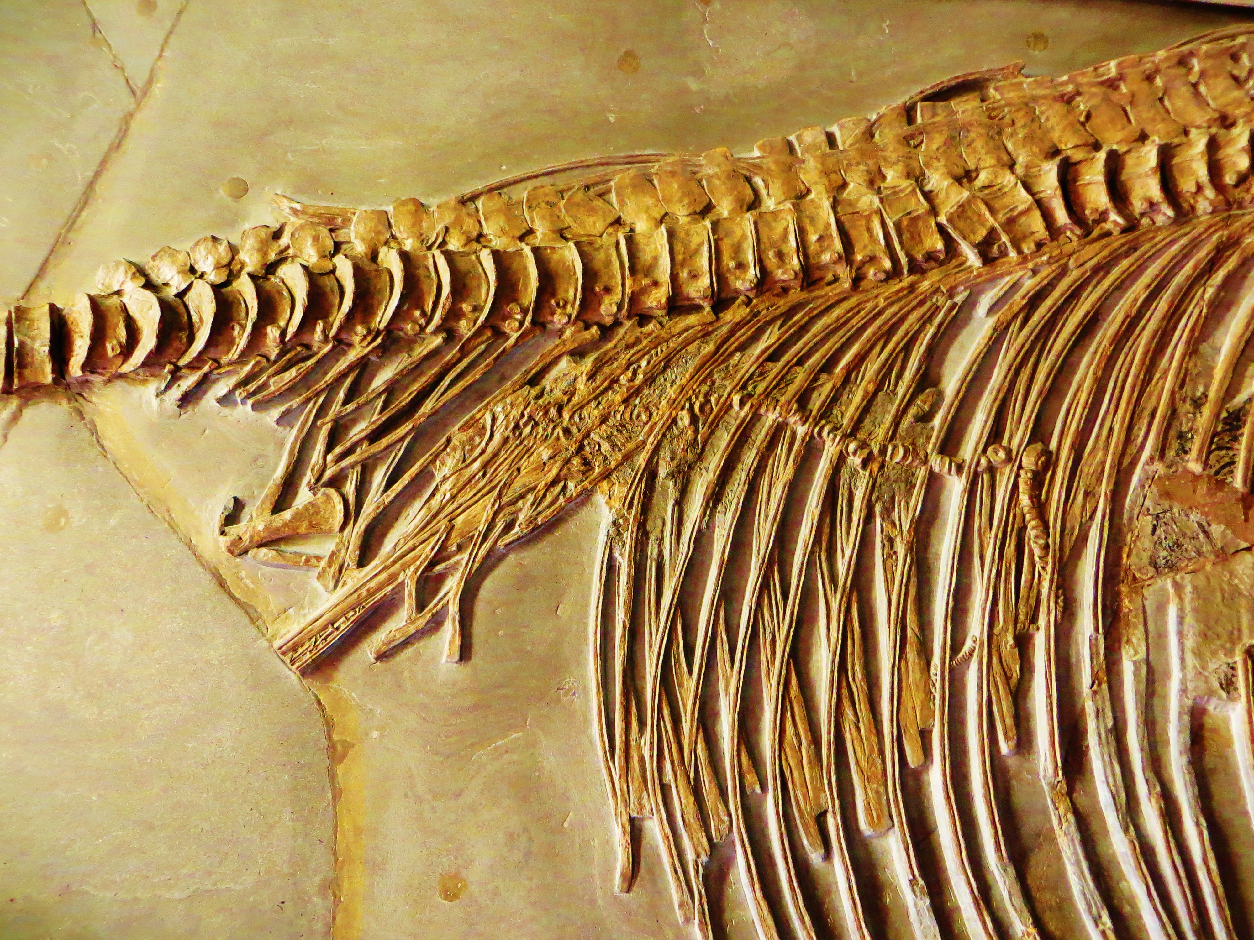 Fossil of Stenopterygius, an extinct reptile- Took the picture at Museum of Paleontology at Tuebingen